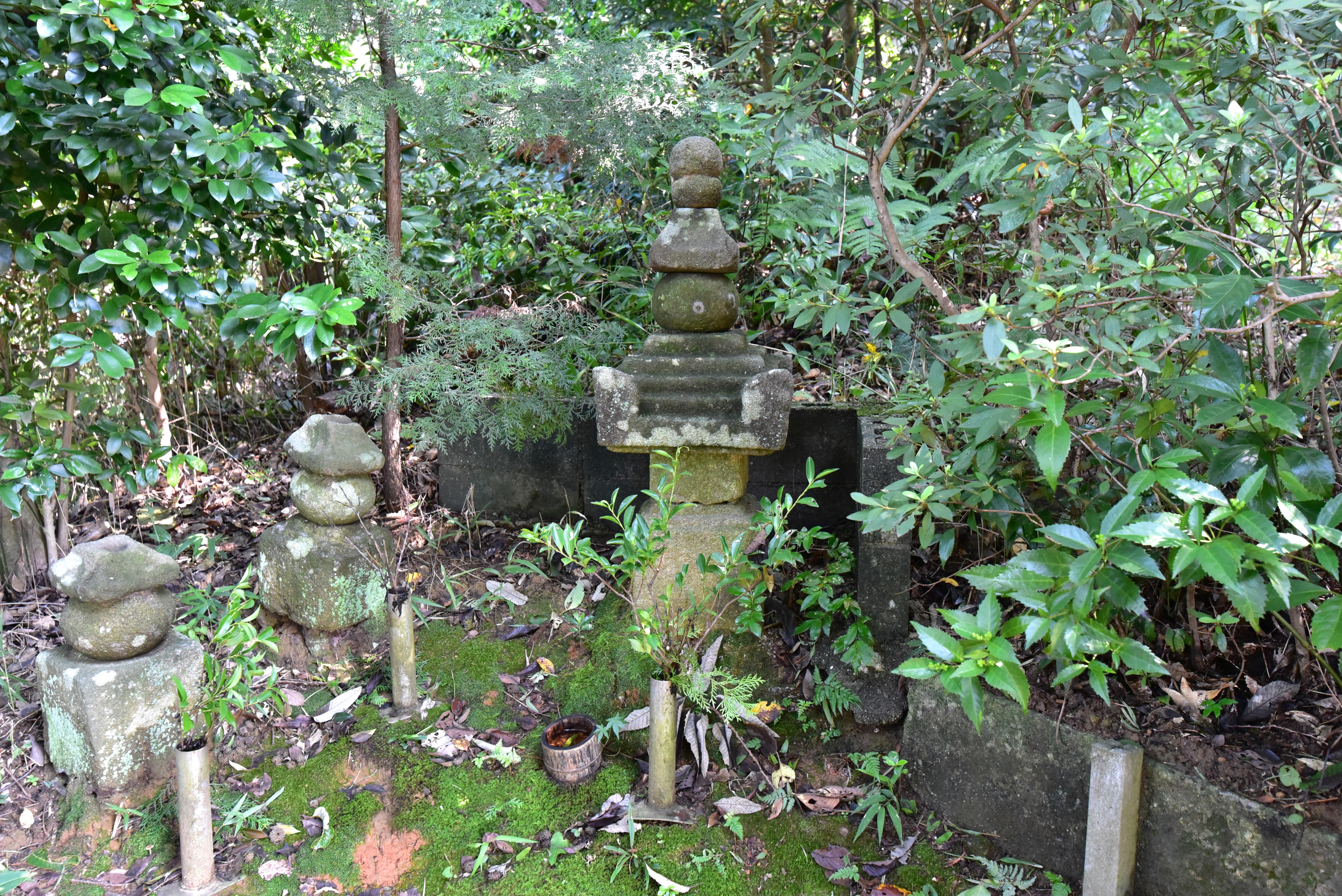 今川義元の首塚 Nikon D750